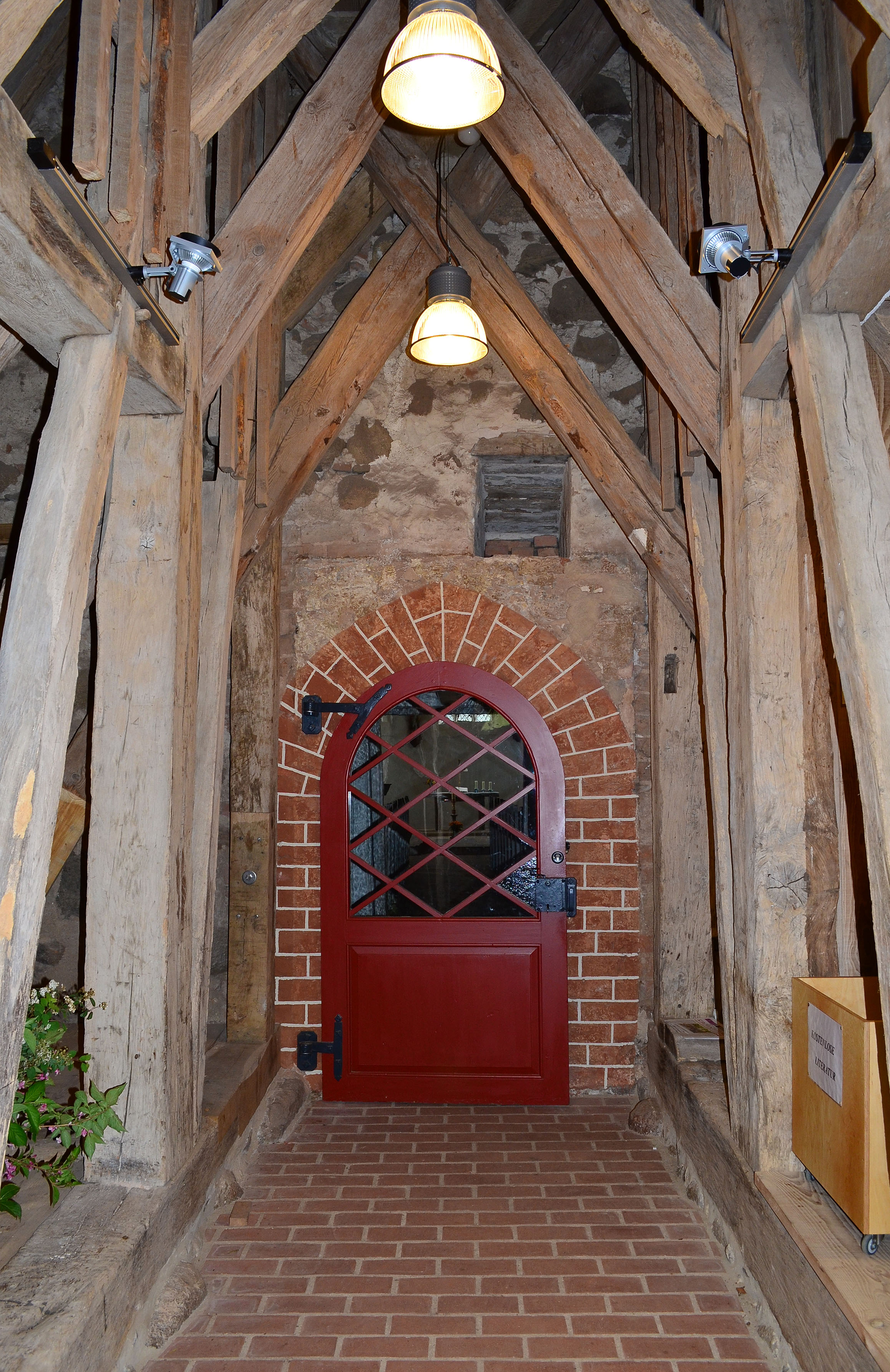 Kühlungsborn, Schlossstraße, ev. Johanniskirche, Eingang durch den Glockenturm zur Kirche 2